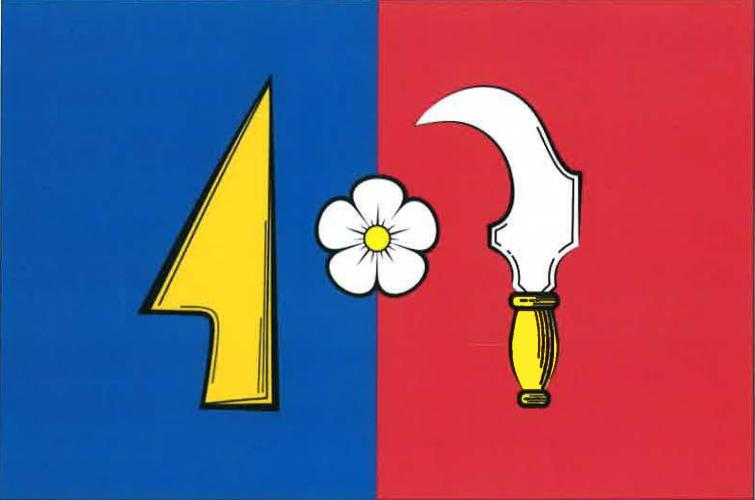 vlajka, Silůvky, okres Brno-venkov